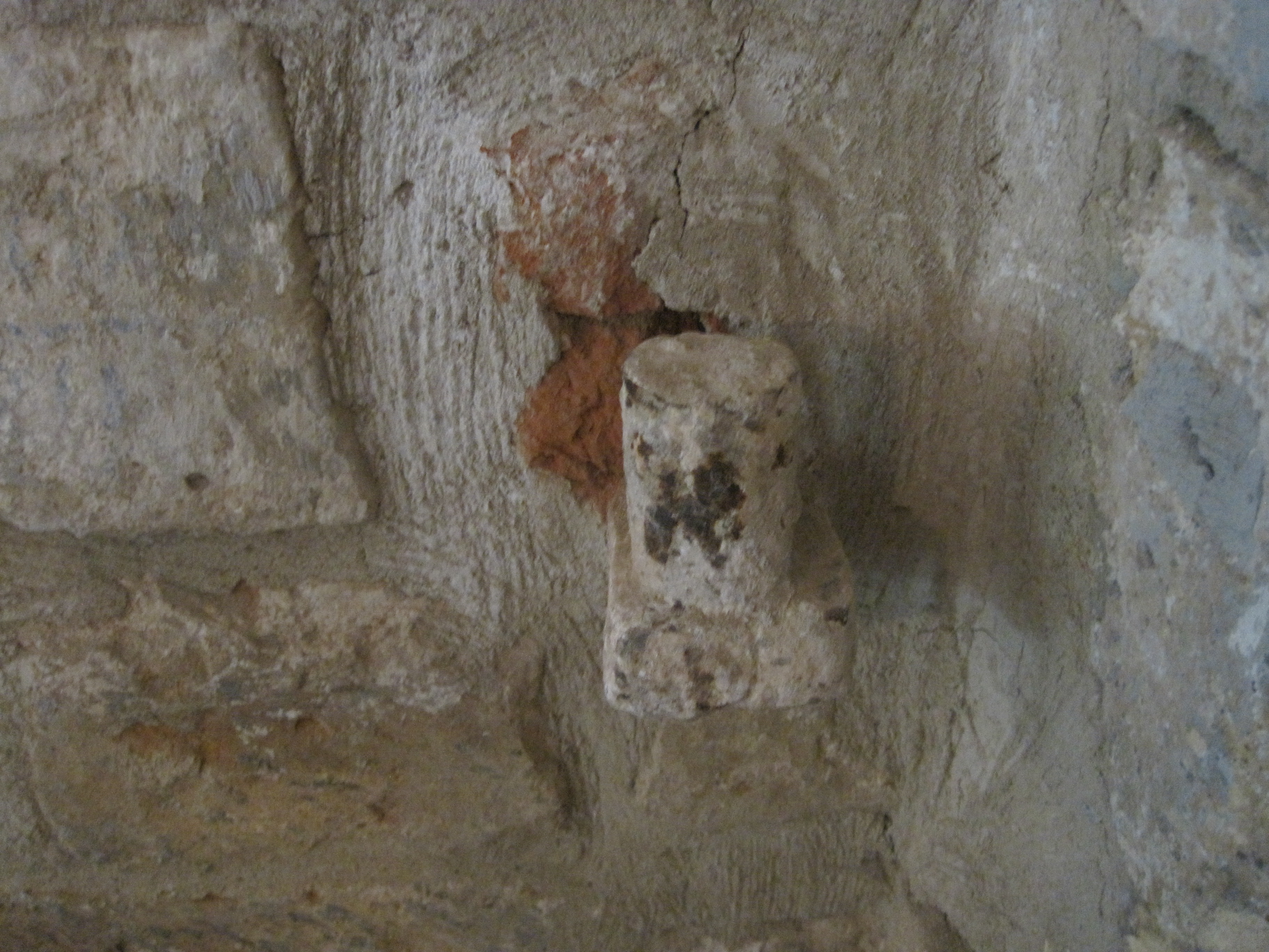 Кремлевские ворота